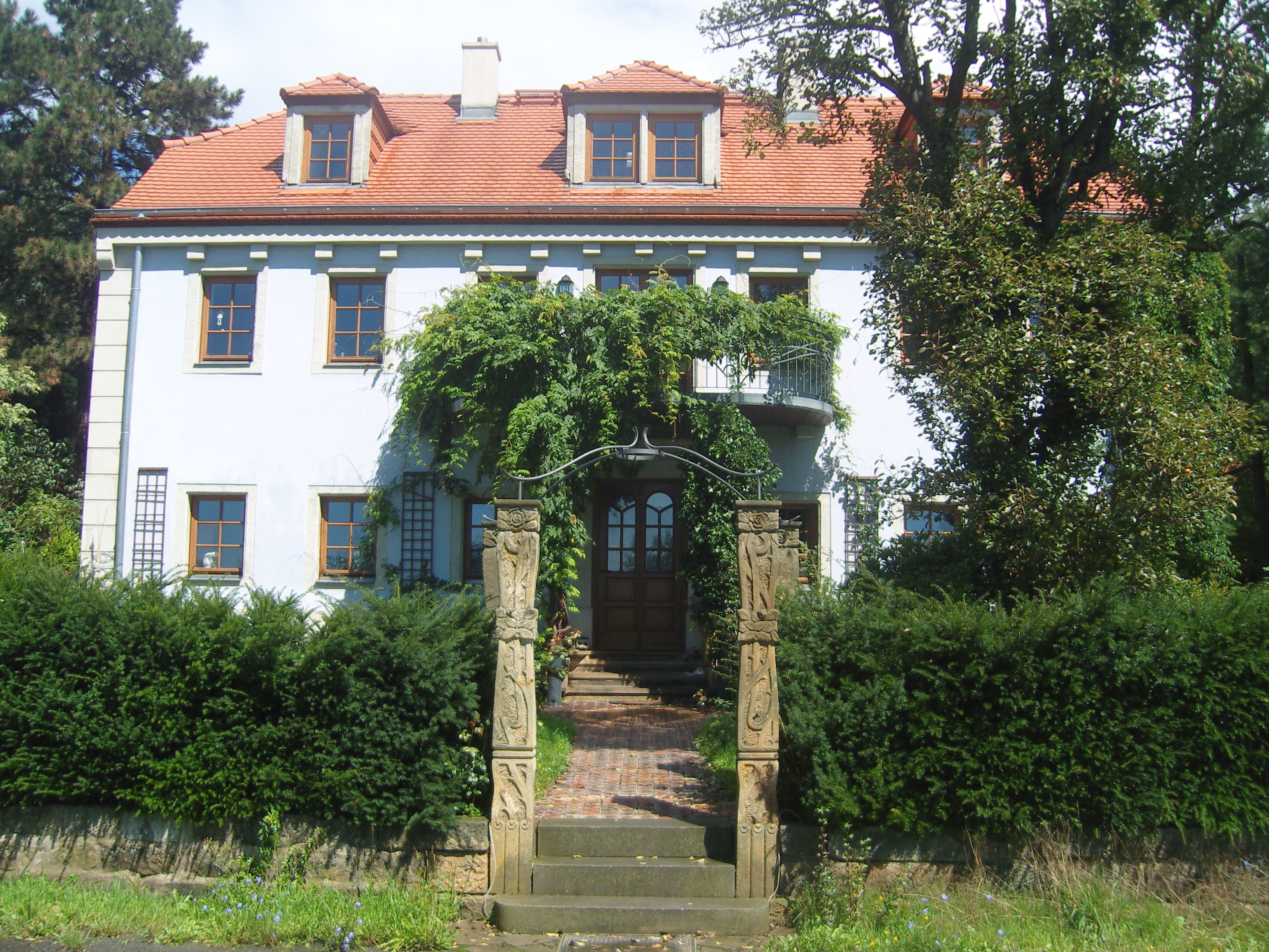 Denkmalgeschütztes Blaschka-Haus, Wohnhaus in offener Bebauung in der Dresdner Straße 101 in Dresden